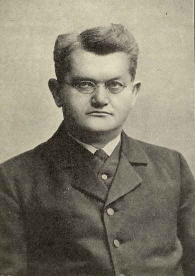 Ambros Opitz (1846 - 1907), Rakouský a český katolický duchovní, novinář, vydavatel a politik.